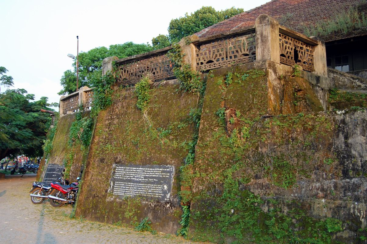 വിഭാഗം:ചരിത്രസ്മാരകങ്ങളുടെ ചിത്രങ്ങൾ വിഭാഗം:കോട്ടകളുടെ ചിത്രങ്ങൾ വിഭാഗം:കേരളത്തിലെ കോട്ടകളുടെ ചിത്രങ്ങൾ